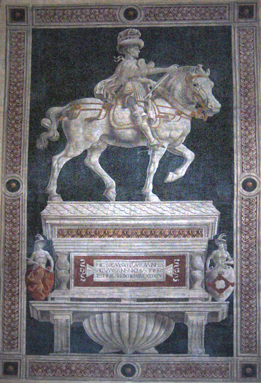 Fresco de Niccolò da Tolentino (1456) Fresco (transfered on canvas) of Niccolo da Tolentino by Andrea del Castagno; Duomo Santa Maria del Fiore, Florence, Italy Own photo - photo made on 13 October 2005